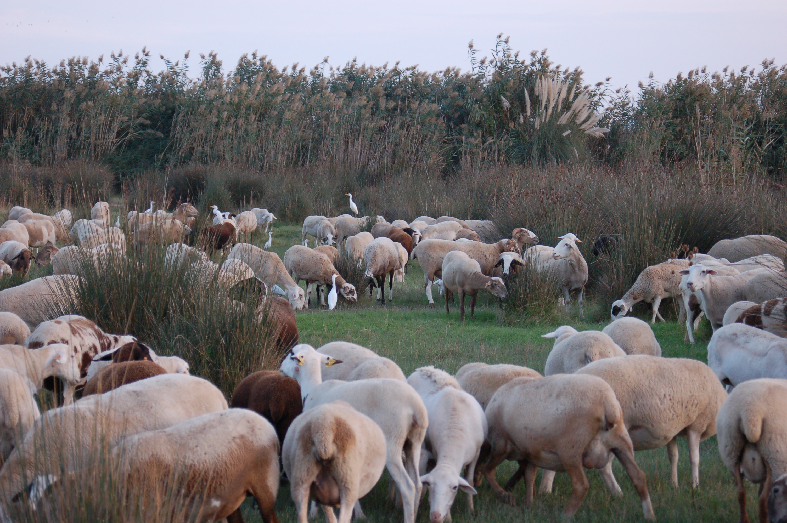 Puntualment a Can Dimoni hi han pasturat ramats de bens acompanyats sovint per esplugabous